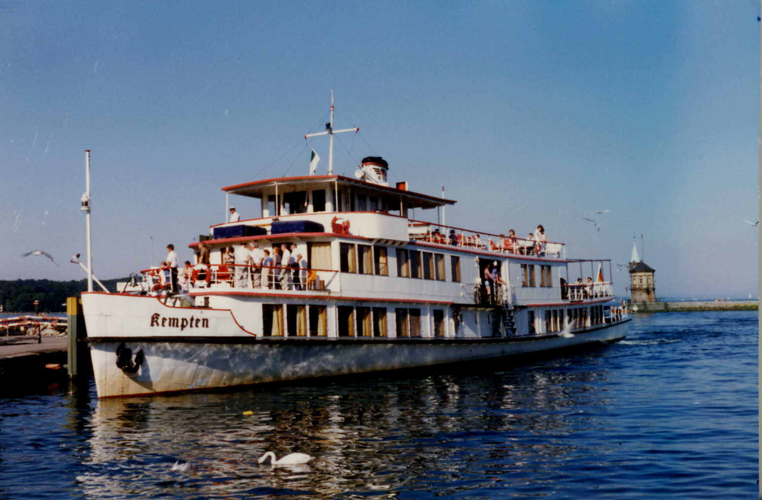 Kempten im Hafen von Konstanz